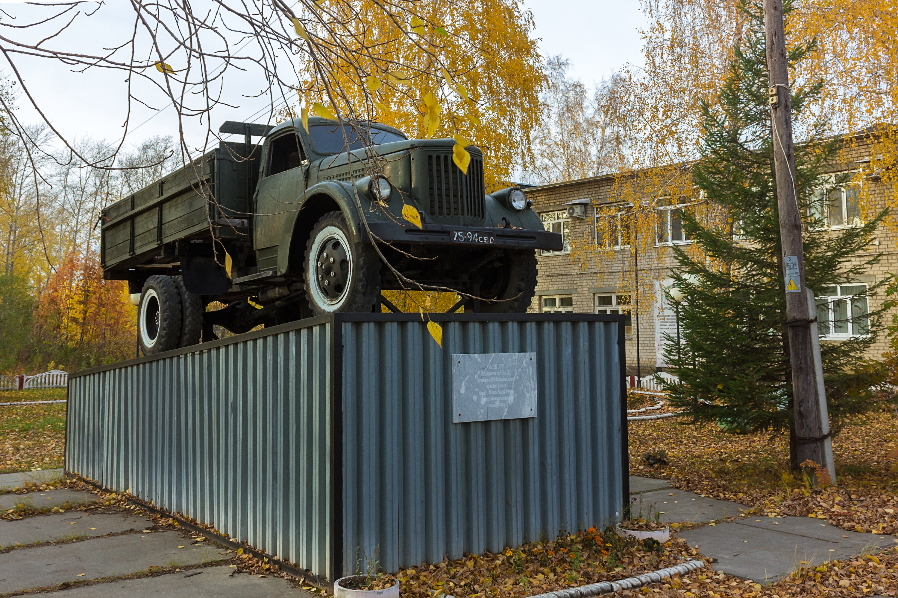 Место